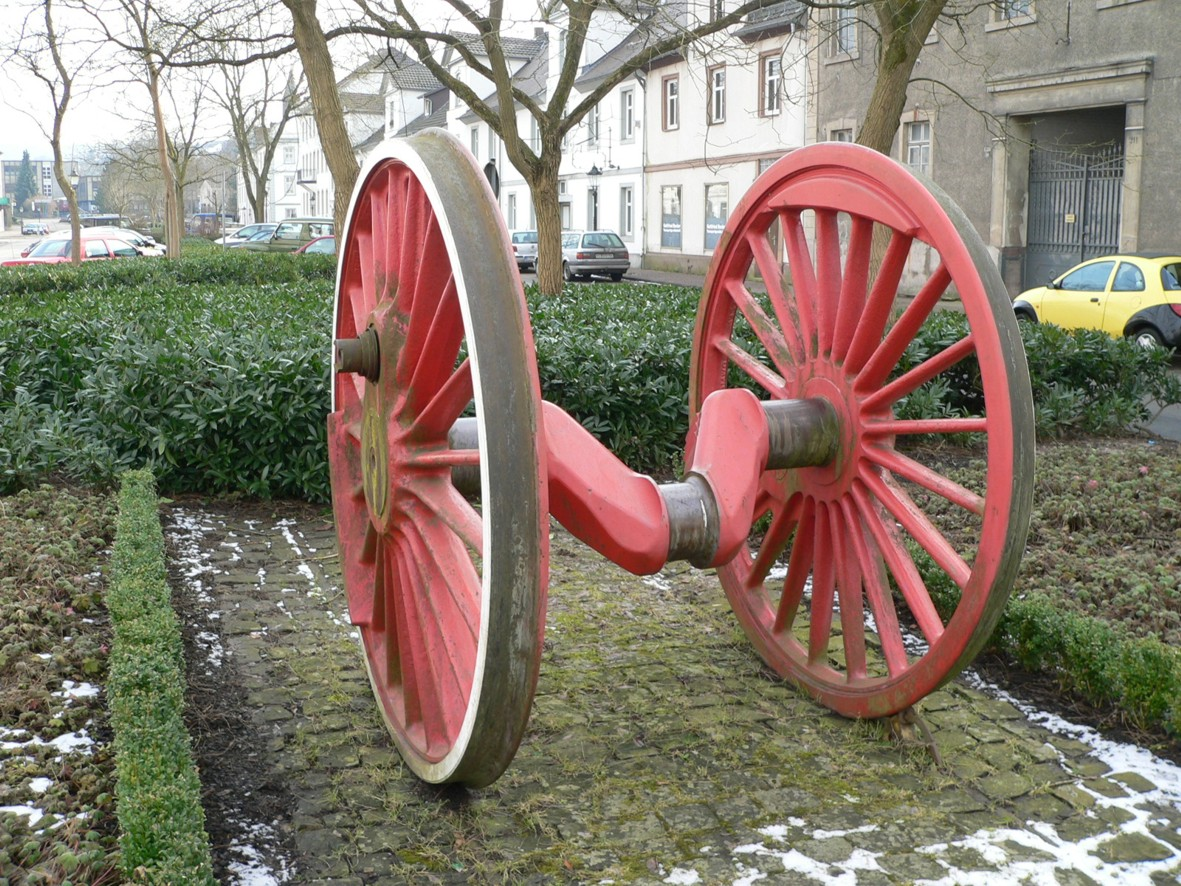 Radsatz zur Erinnerung an die Carlsbahn in Bad Karlshafen Fotograf: selbst fotografiert Datum: 12.02.2006 Detailinformation: Vorderer Treibradsatz einer DRG Baureihe 01.10